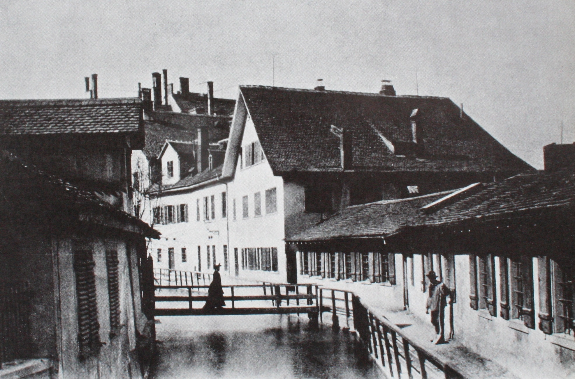 Hinter dem Haus zur Trülle am Sihlkanal; 1899 Zustand um 1900, bis zum Bau der Uraniastrasse 1904, Seidenhöfe 10: Wohnhaus "Zum kleinen Seidenhof"